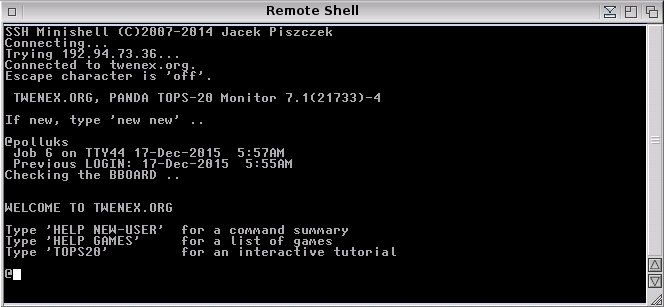 login